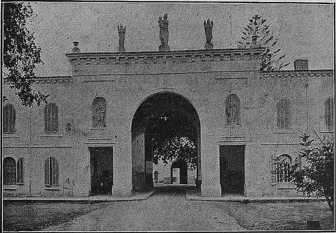 Trappe Notre Dame de Staoueli, porte d'entrée